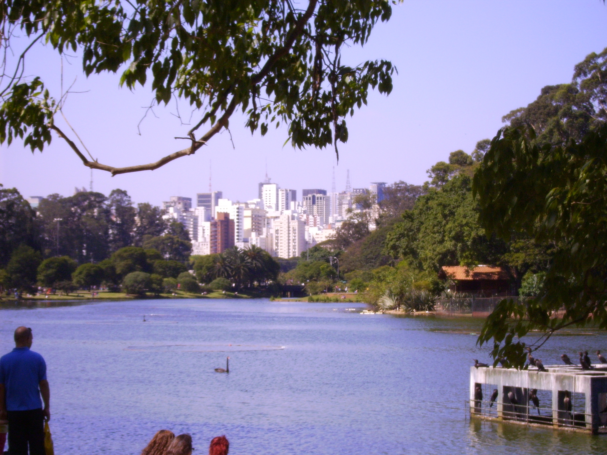 lake before city skyline in Parque do Ibirapuera in Sao Paulo, Brazil